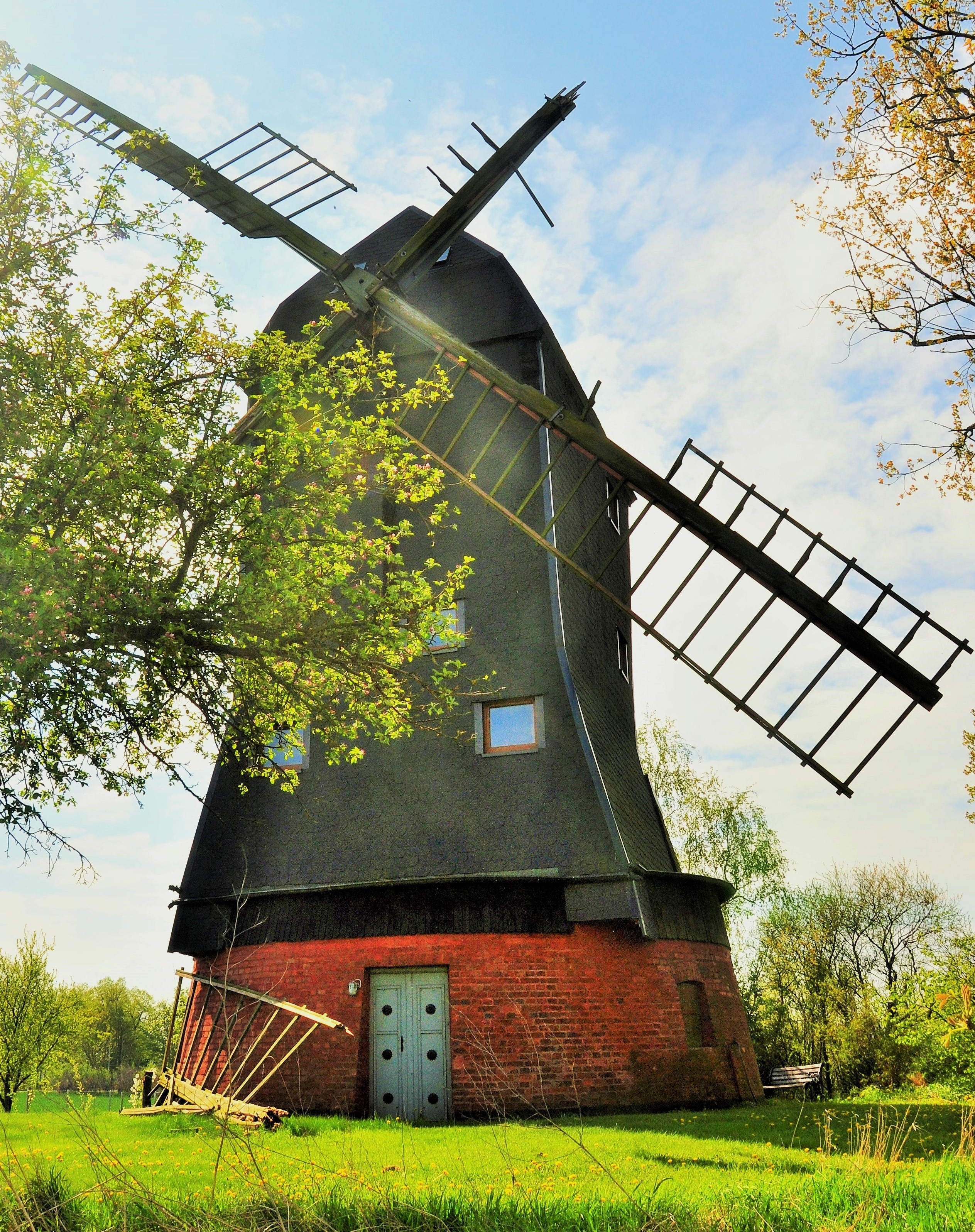 Das Jahr 2013 war kein glückliches für die imposante Paltrockwindmühle (hochliegender Rollenkranz) in Breitenhagen. Im Juni sorgte ein Jahrtausendhochwasser mit Saalefluten für eine Überschwemmung; im zweiten Halbjahr beschädigten Stürme das Rutenkreuz. Standort: 39240 Breitenhagen, Breite Straße 1 (Ortsausgang nach Groß Rosenburg)